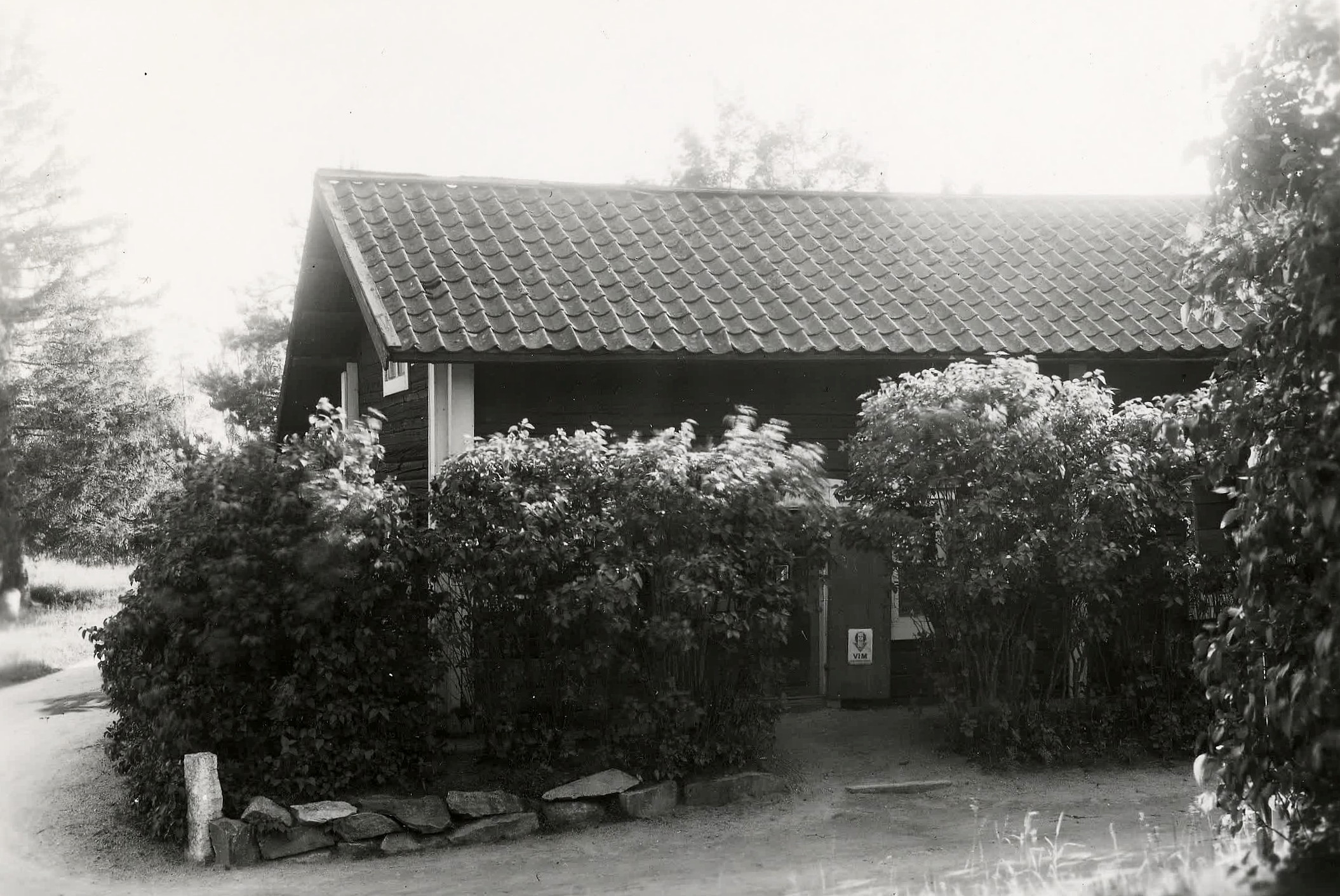 Thorgrens Lanthandel i Uttersberg (idag på Vallby Friluftsmuseum)